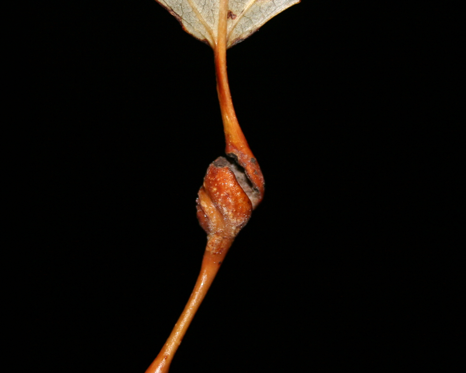 Flugloch von Pemphigus spirthecae